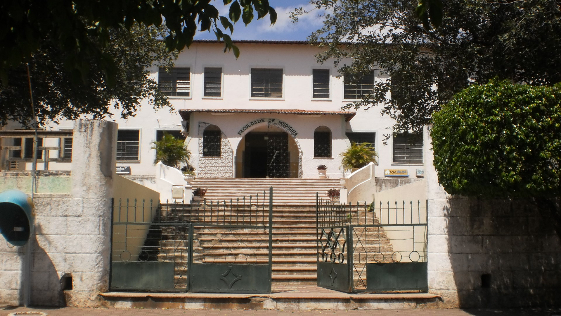 Fachada do prédio da Faculdade de Medicina do Cariri - UFC. Barbalha.